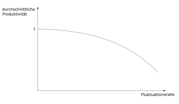 Zusammenhang zwischen Produktivität und Fluktuationsrate